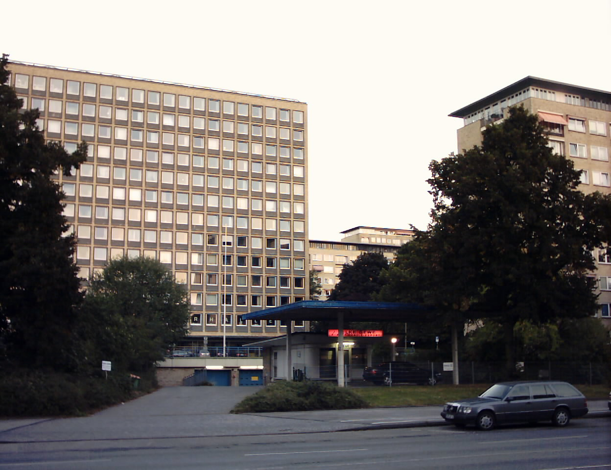 Bildbeschreibung: Grindelhochhäuser, Hamburg-Harvestehude, Tankstelle Datum: 21.9.2005